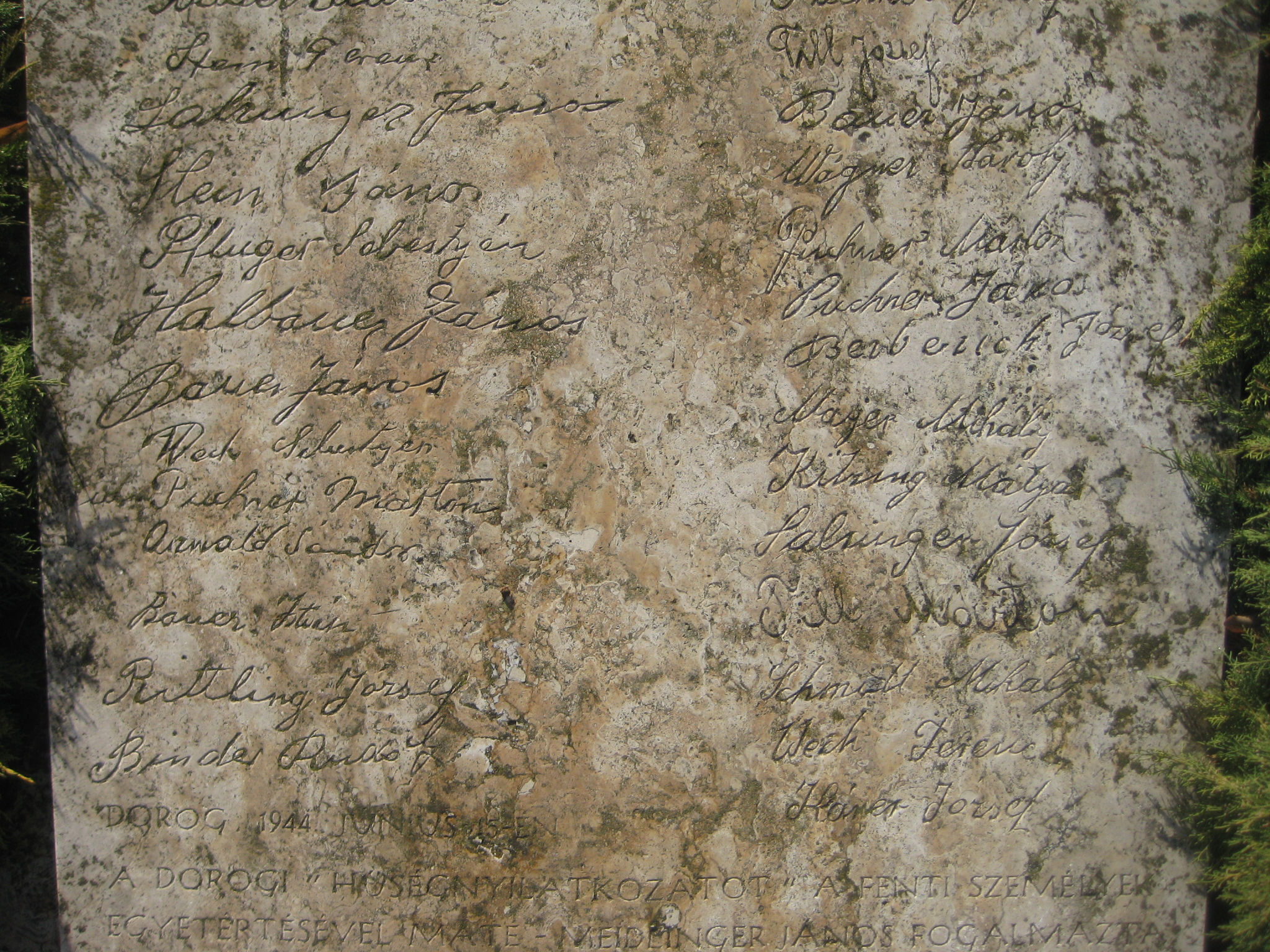 Dorogi Hűségnyilatkozat harmadik kép.